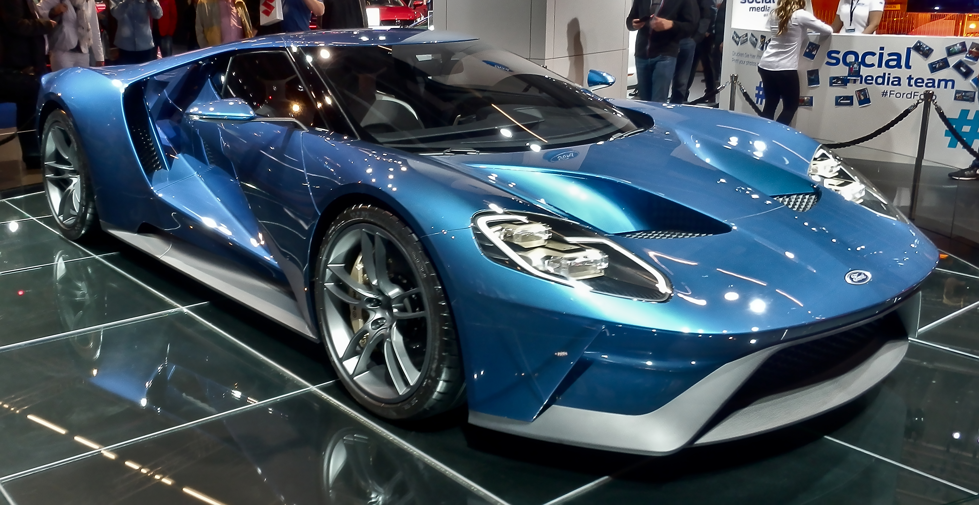 Ford GT at IAA 2015